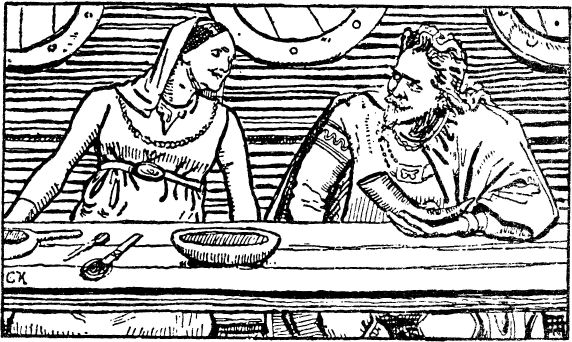 Christian Krogh: Illustration for Håkon jarls saga, Heimskringla 1899-edition. nn: «Då vart det stor kjærleik mellom Håkon jarl og Gunnhild.» nb: «Nå ble det slik kjærlighet mellom Håkon og Gunnhild.»